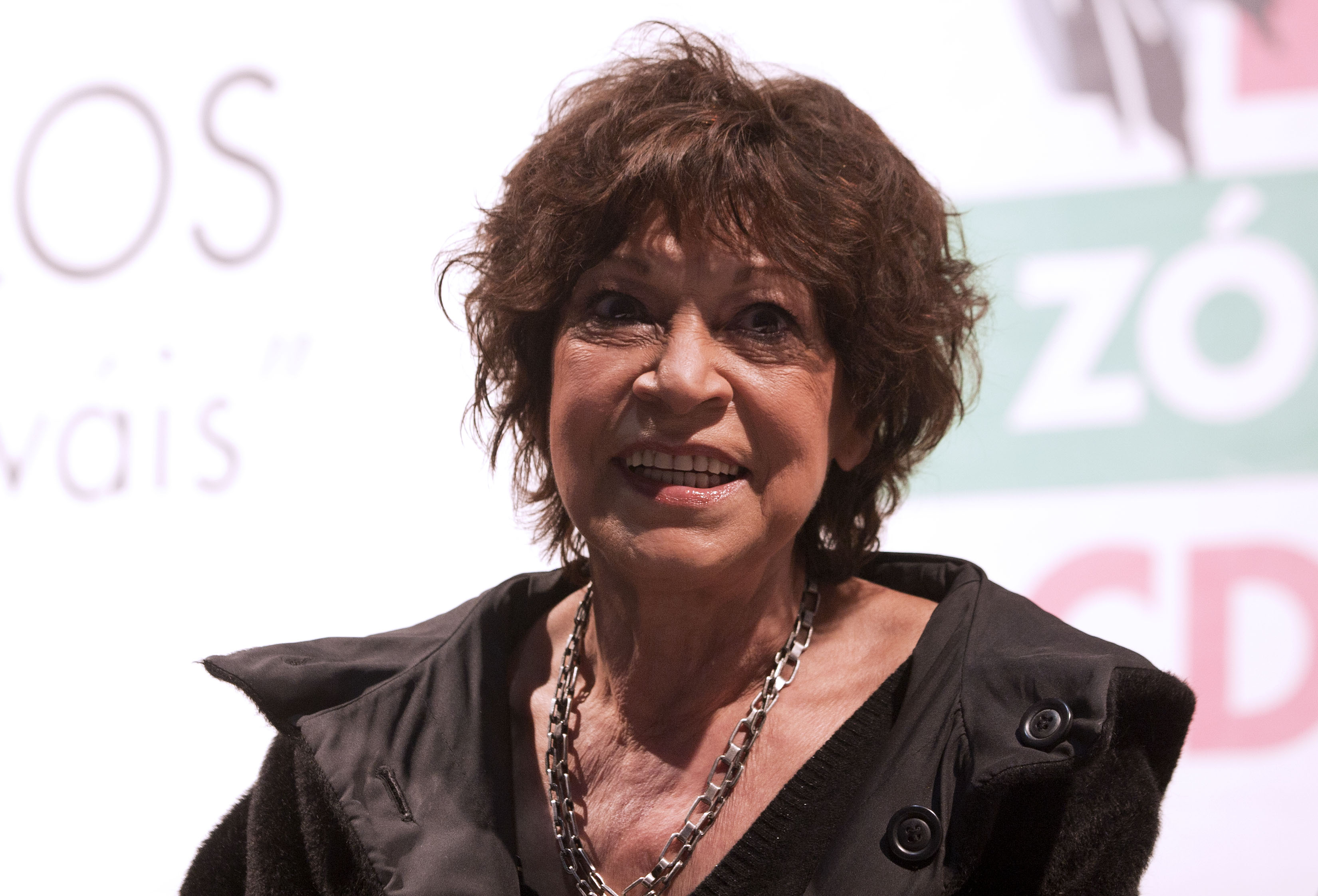 Jueves, 24 de Octubre 2013. Charla con la escritora Cristina Pacheco y Paco Ignacio Taibo II en la XIII Feria Internacional del Libro del Zócalo de la Ciudad de Mexico. Foto: Octavio Nava/Secretaria de Cultura